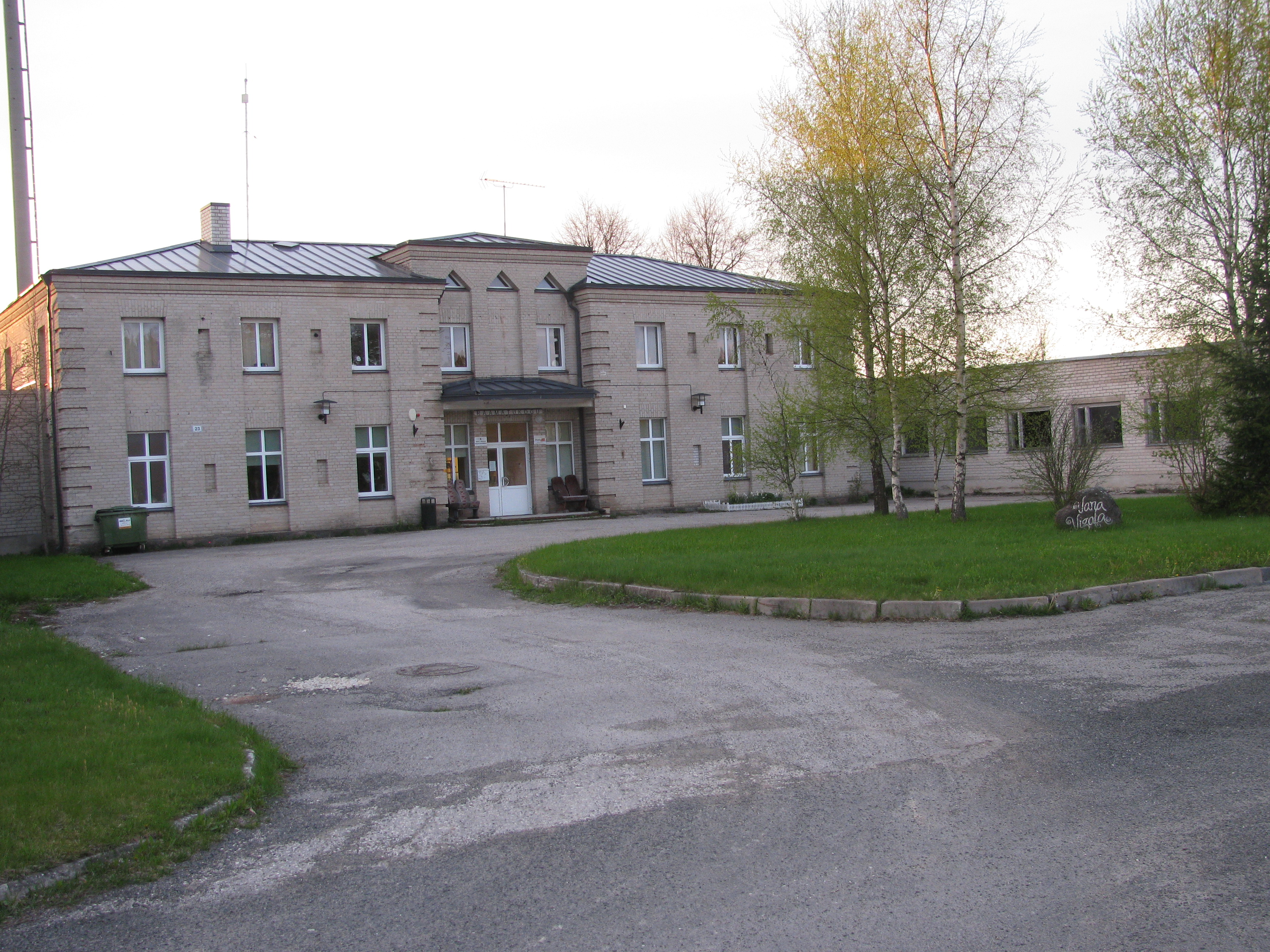 Vana-Vigala raamatukogu endises raudteejaamahoones